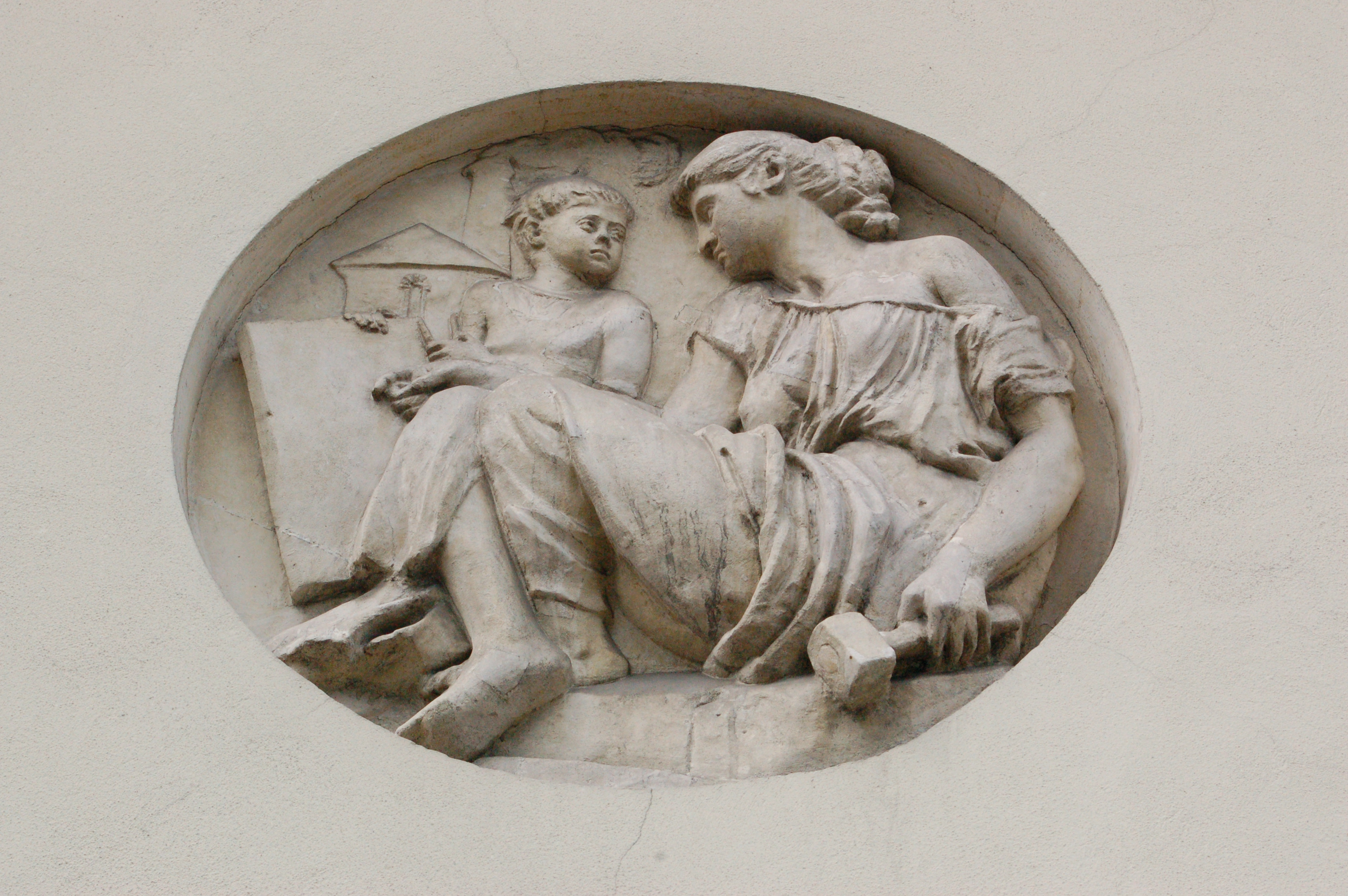 Warschau, Medaillons von Ludwik Kucharzewski an der Fassade der Rau-Villa